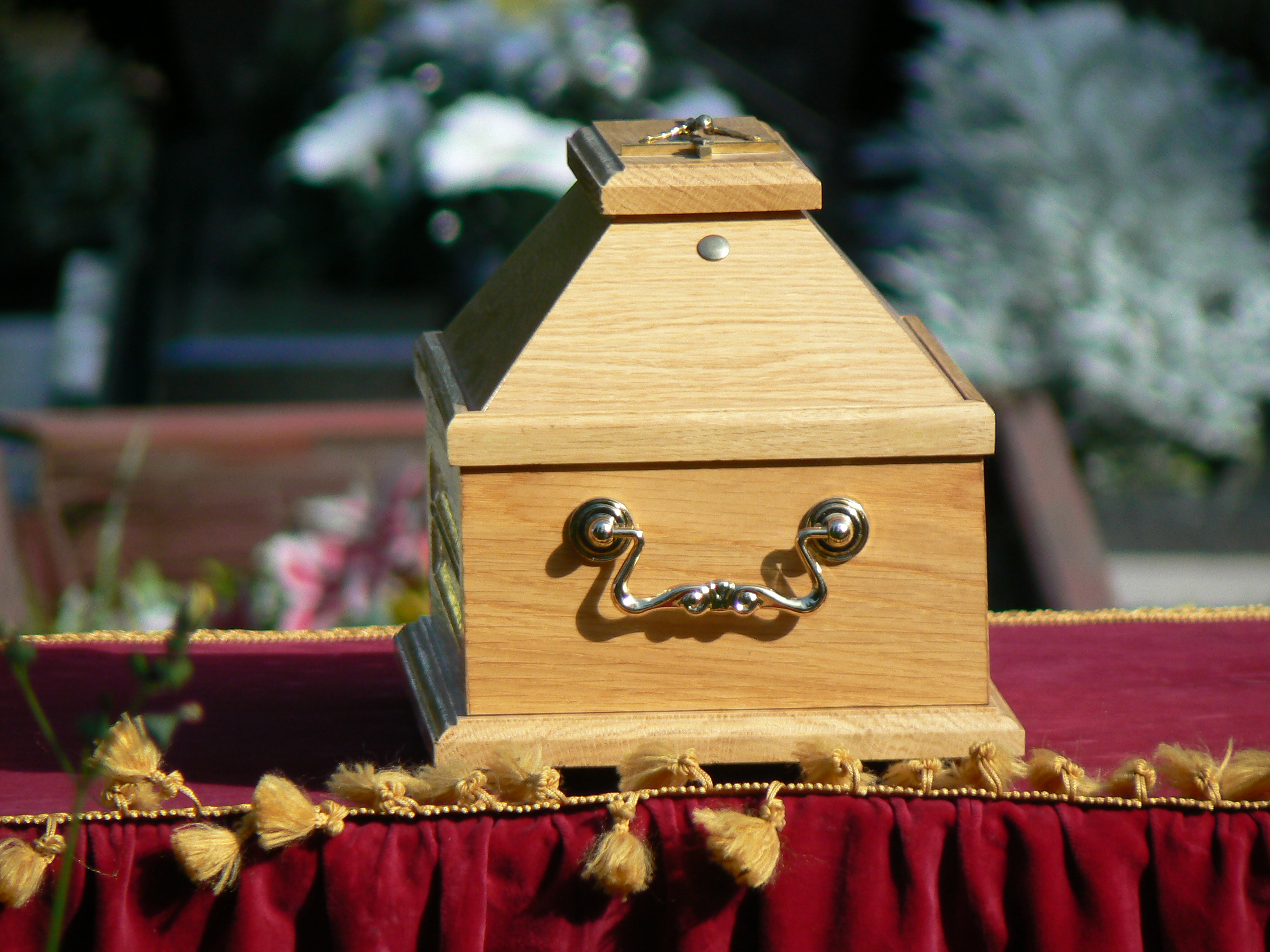 Trumna do pochówku popiołów. Wysokość ok. 30 cm.